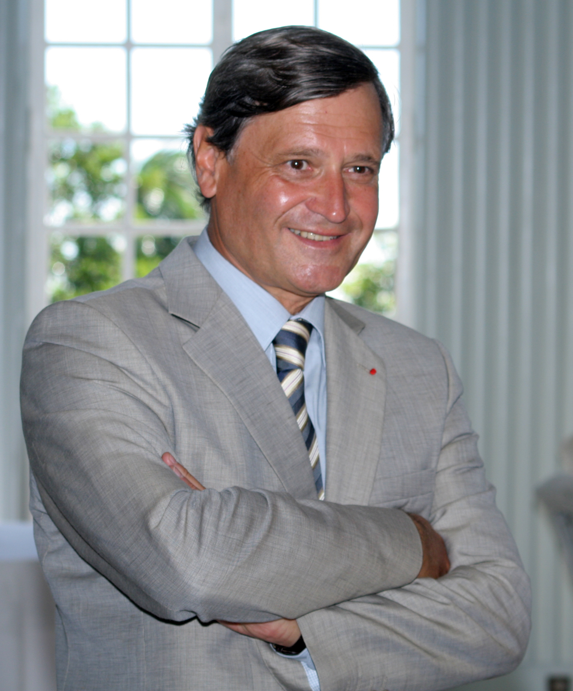 Pierre-Henry Maccioni, préfet de La Réunion